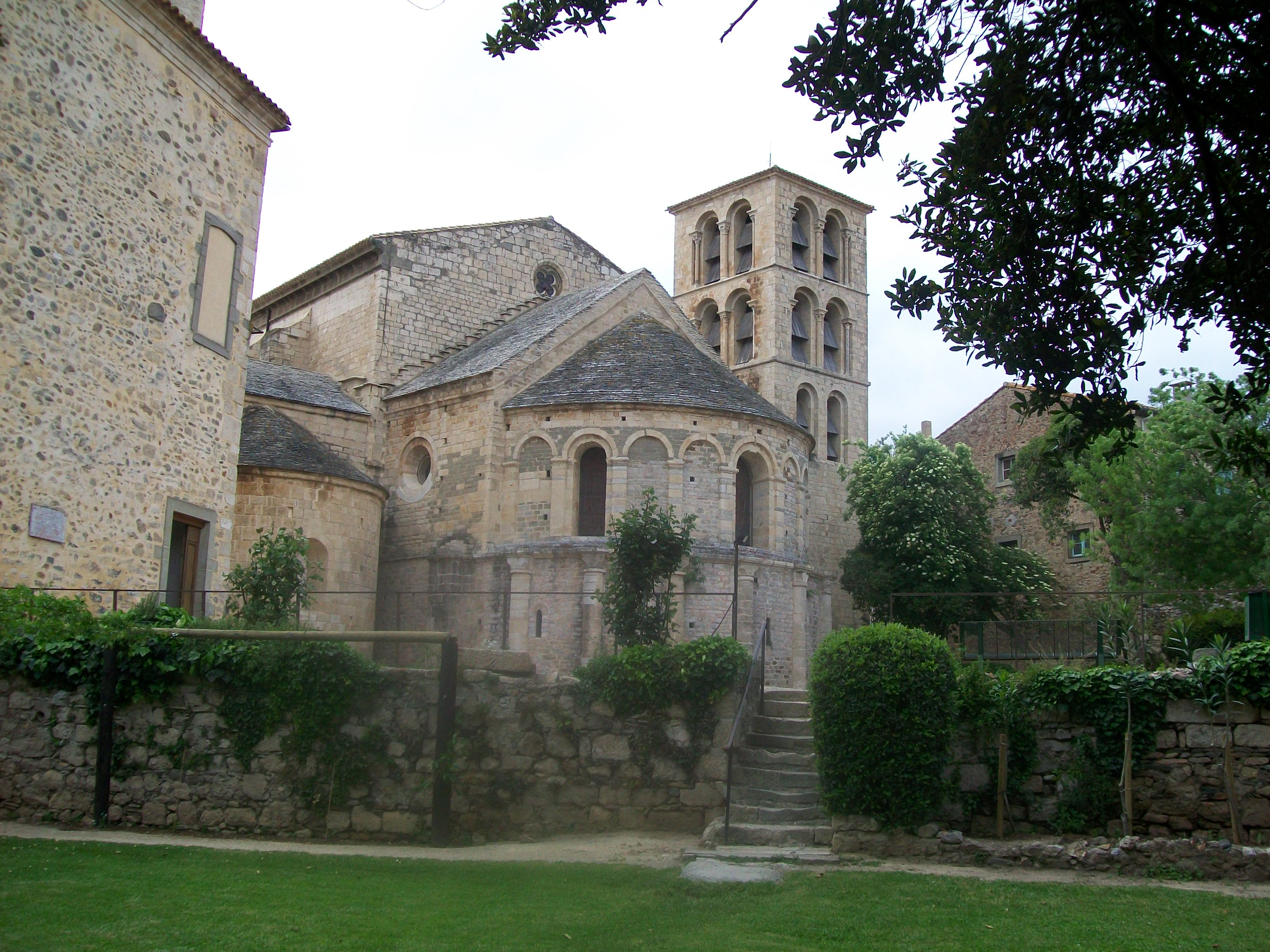 Ancienne abbaye de Caunes-Minervois (Aude, France).